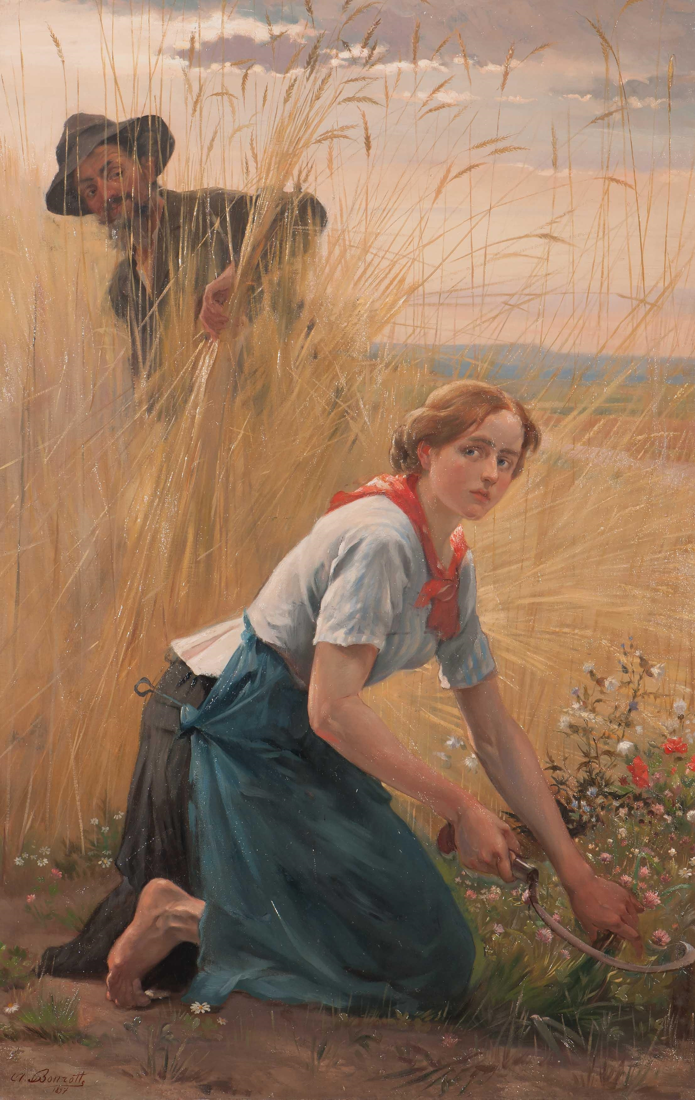 Le Rôdeur